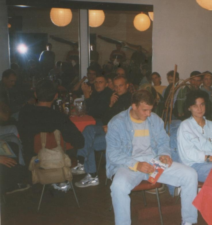 I Spadochronowe Mistrzostwa Śląska Juniorów w celności lądowania 1995, zwycięzcy i zwyciężeni odprężają się przy kuflu piwa. Pierwsza z prawej Natalia Myrczik - Sekcja Spadochronowa Aeroklubu Gliwickiego